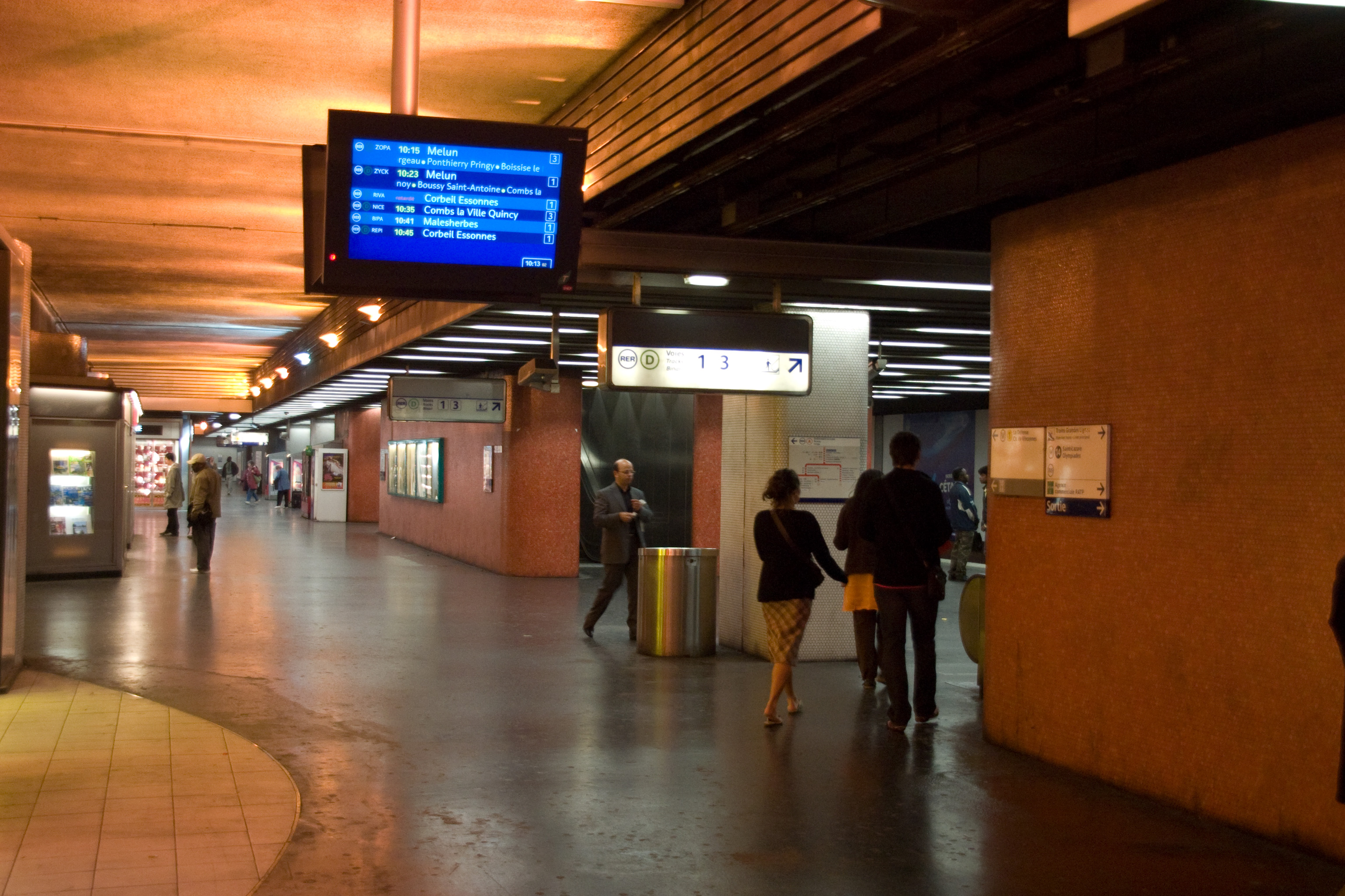 Gare de Lyon, Paris, France